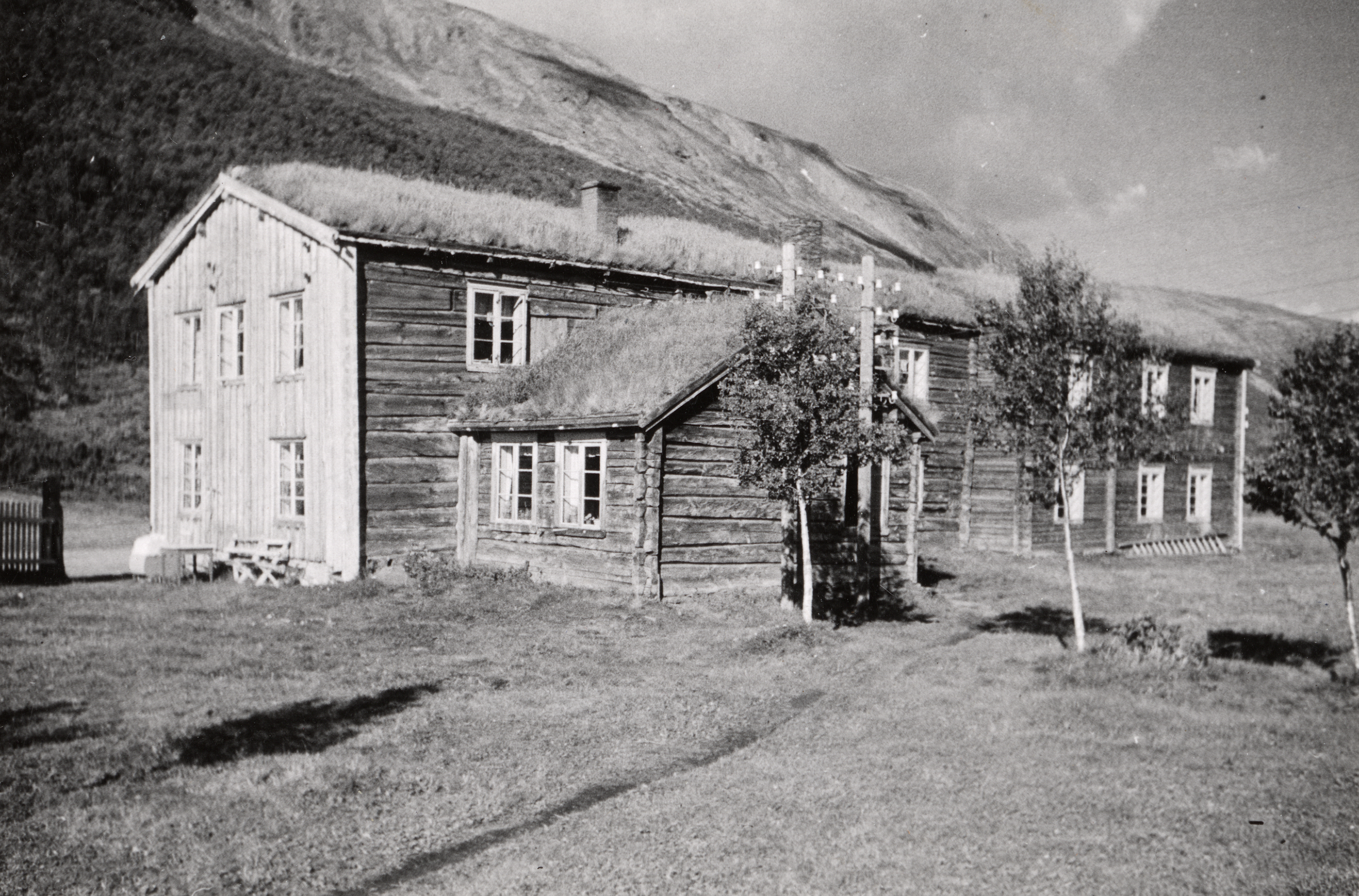 Drivstua i Oppdal, Sør-Trøndelag This image on crowdsourcing geotagging platform Fotodugnad